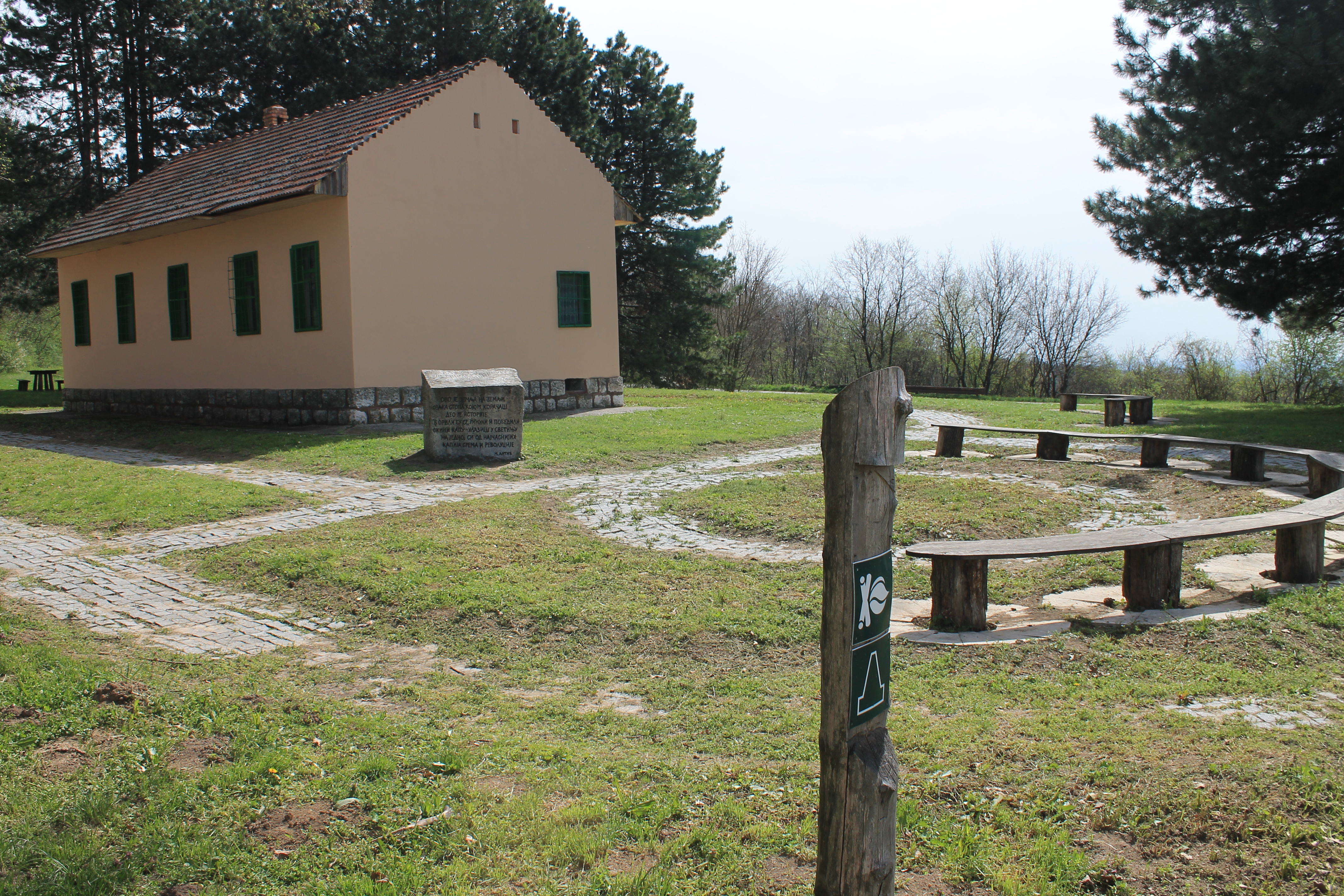 Rohalj baze